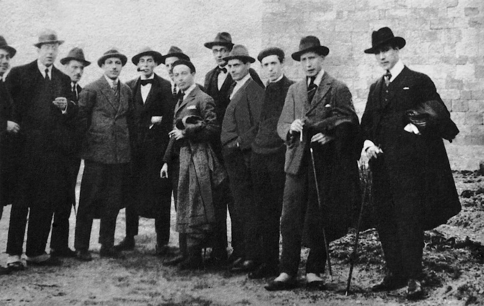 Otero Pedrayo con Antón Losada Diéguez, Manuel Antonio, Antón Villar Ponte, Castelao e outros amigos